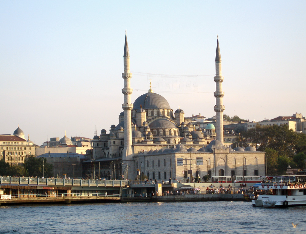 "Neue Moschee" in Eminönü/Istanbul